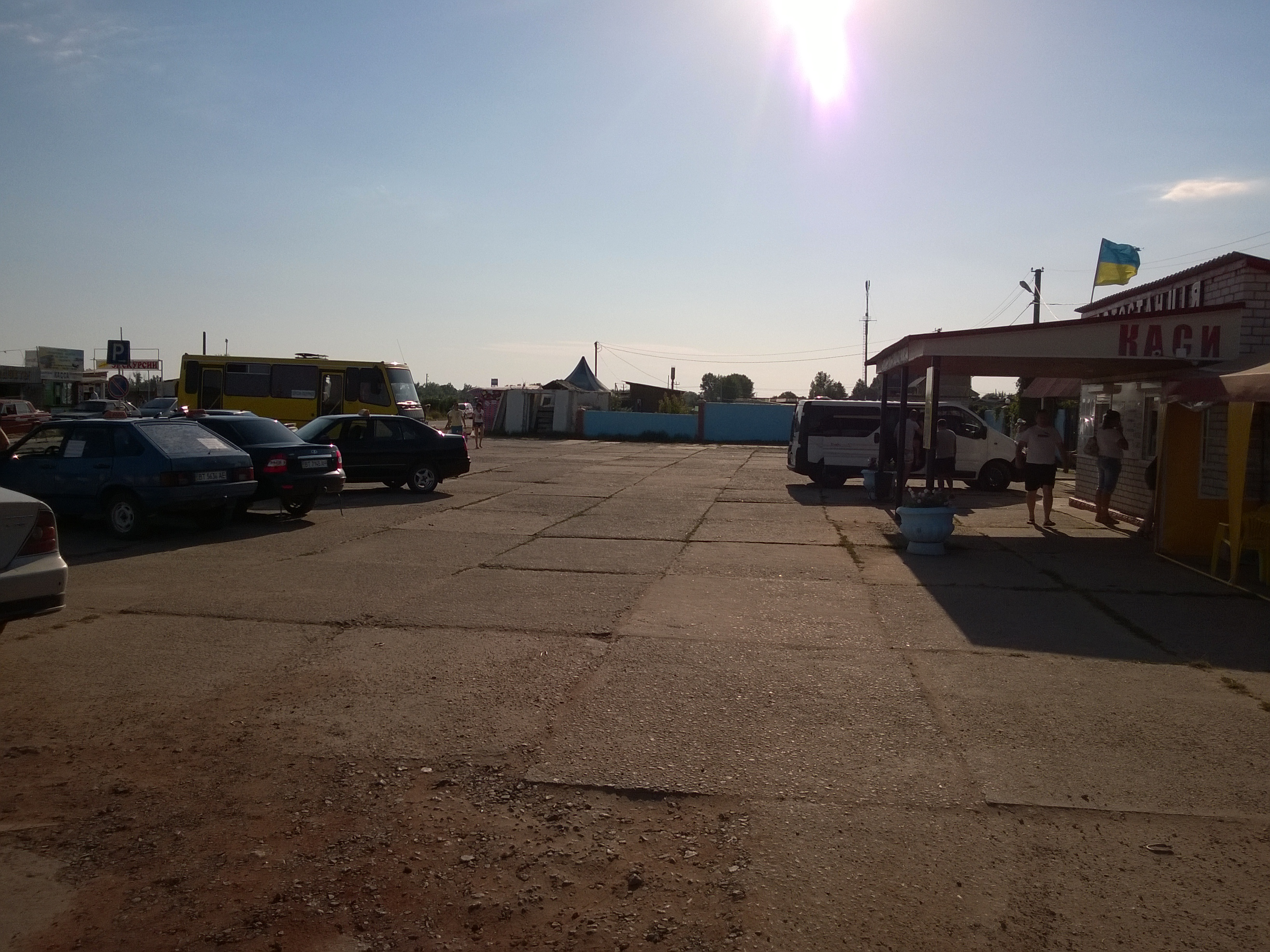 смт. Лазурне